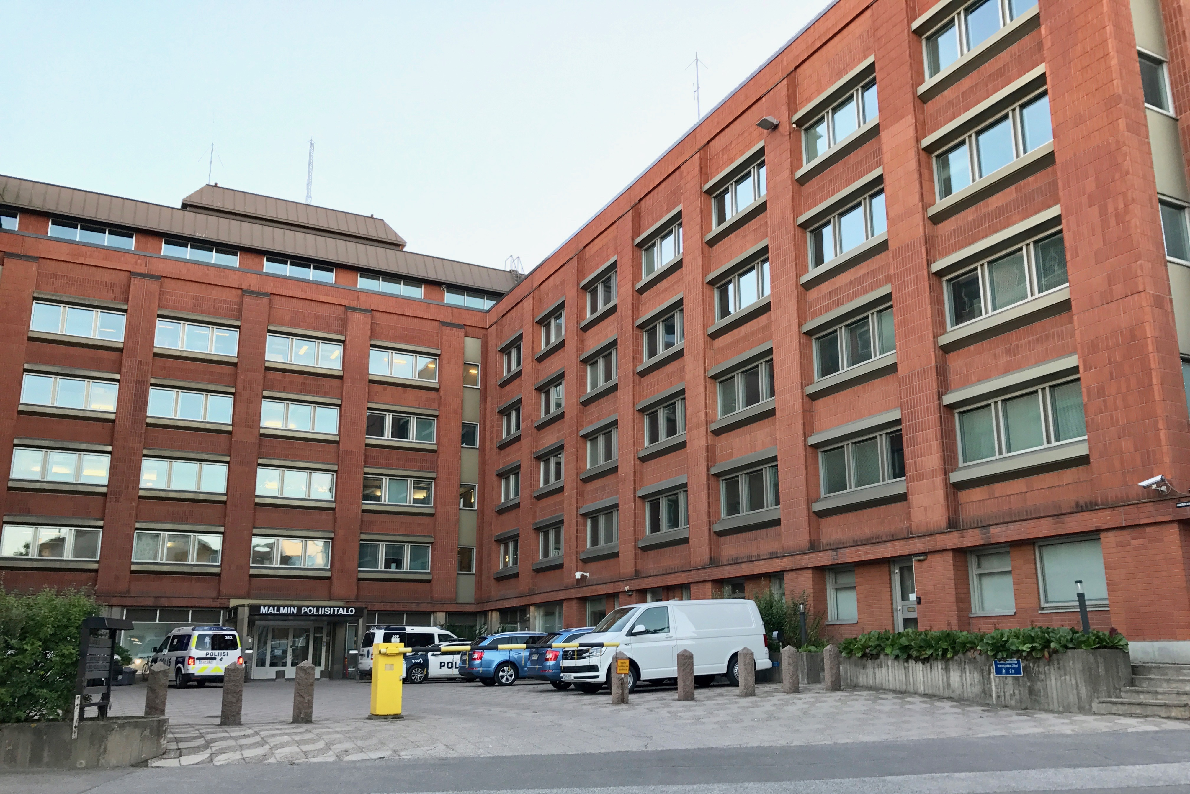 Malmin poliisitalo. Viljatie 2, Helsinki.